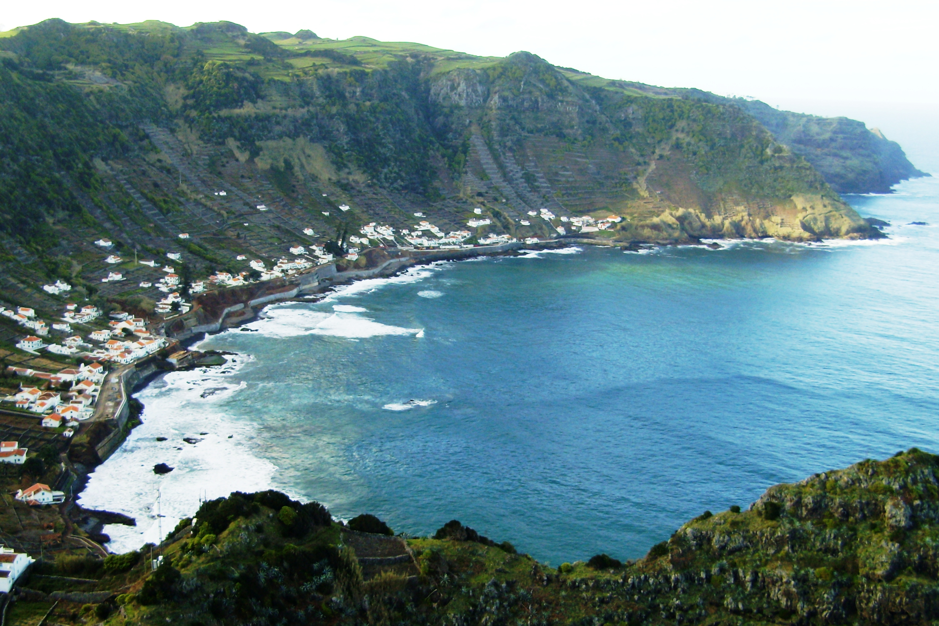 Baía e praia de São Lourenço, freguesia de Santa Bárbara, ilha de Santa Maria, Açores.